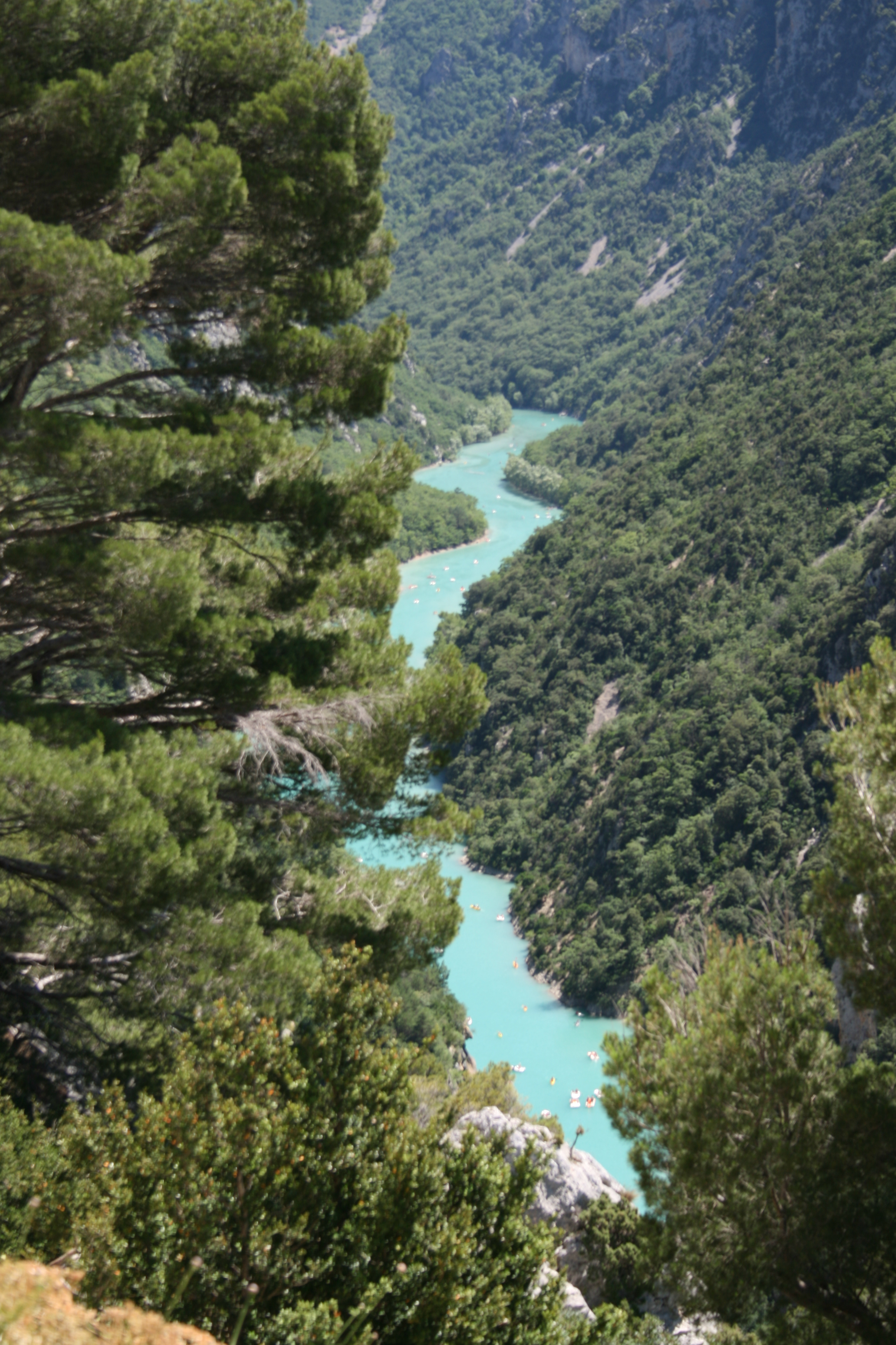 Grand Canyon du Verdon, Alpes de Haute-Provence, France